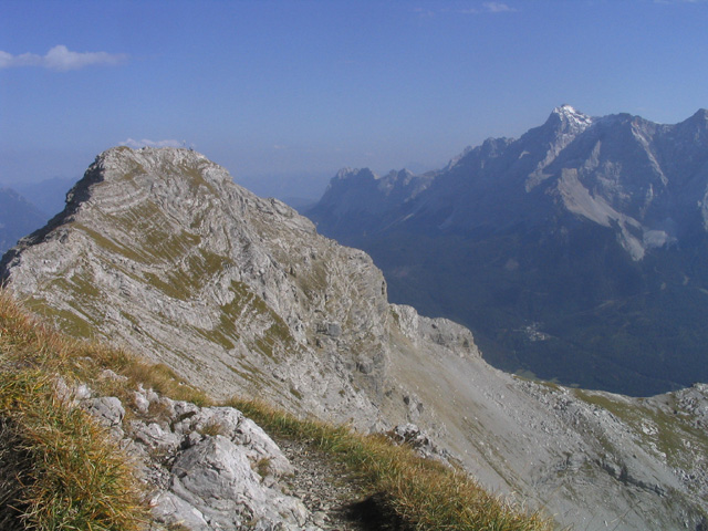 Berg Daniel (2340 m) von der Upsspitze aus gesehen, im Hintergrund die Zugspitze (2962 m).